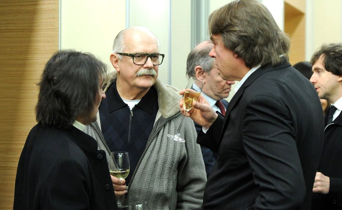 Юрий Башмет, Никита Михалков и Константин Эрнст